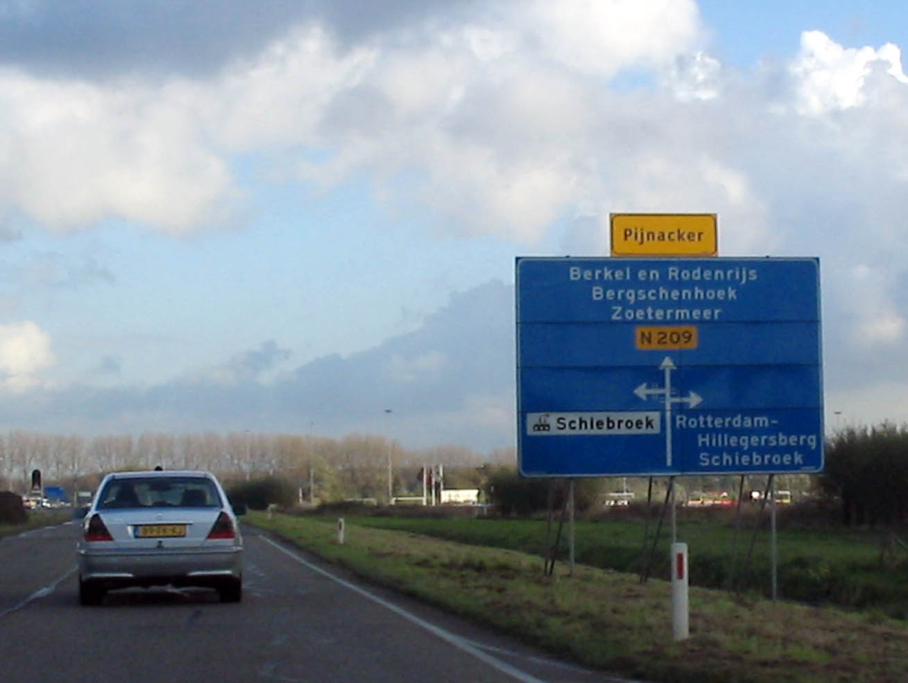 N209 nabij Berkel en Rodenrijs, 7 november 2005